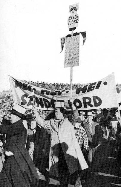 SB-supportere under cupfinalen mot Viking i 1959